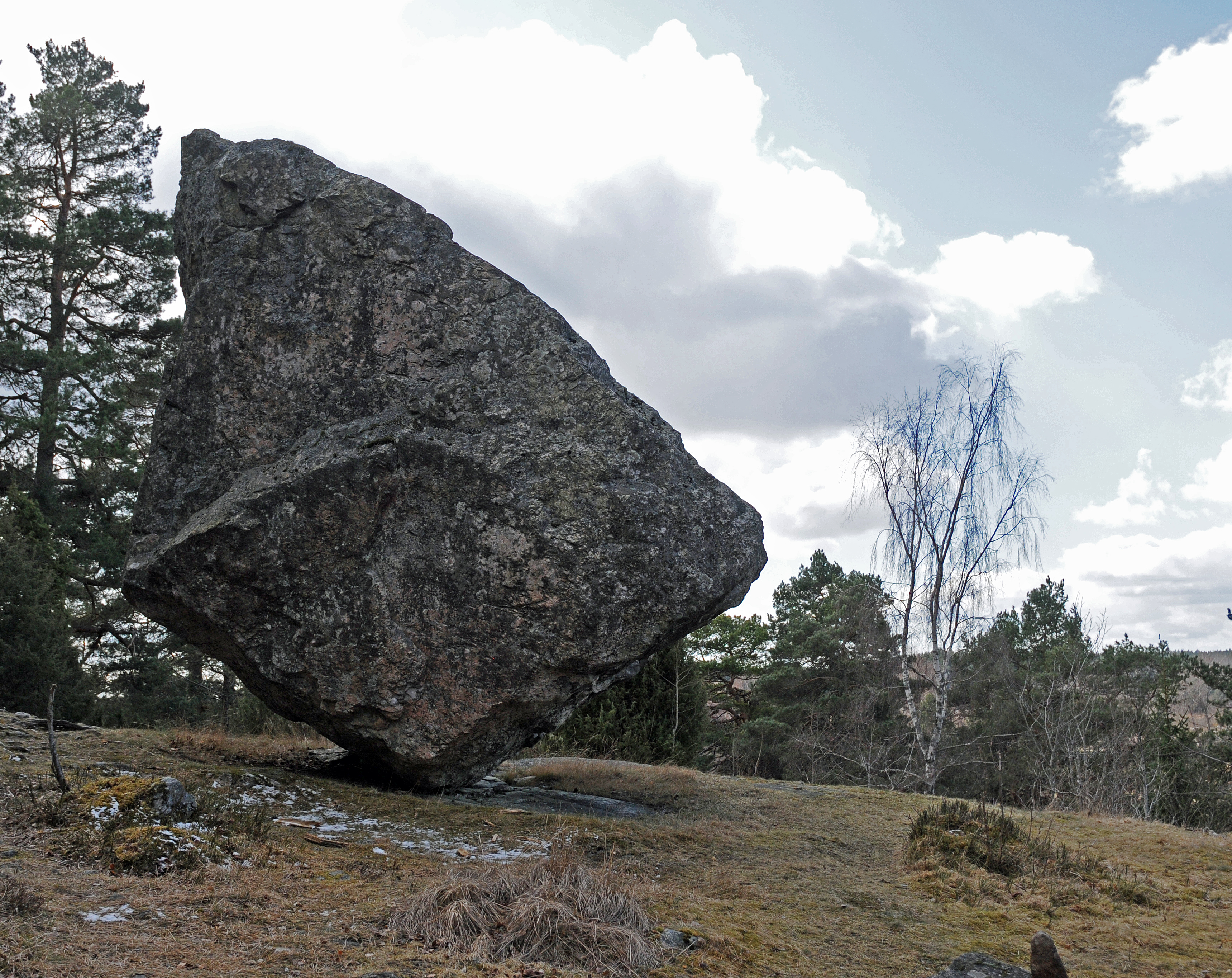 Spikstenen i Ripsa, Södermanland